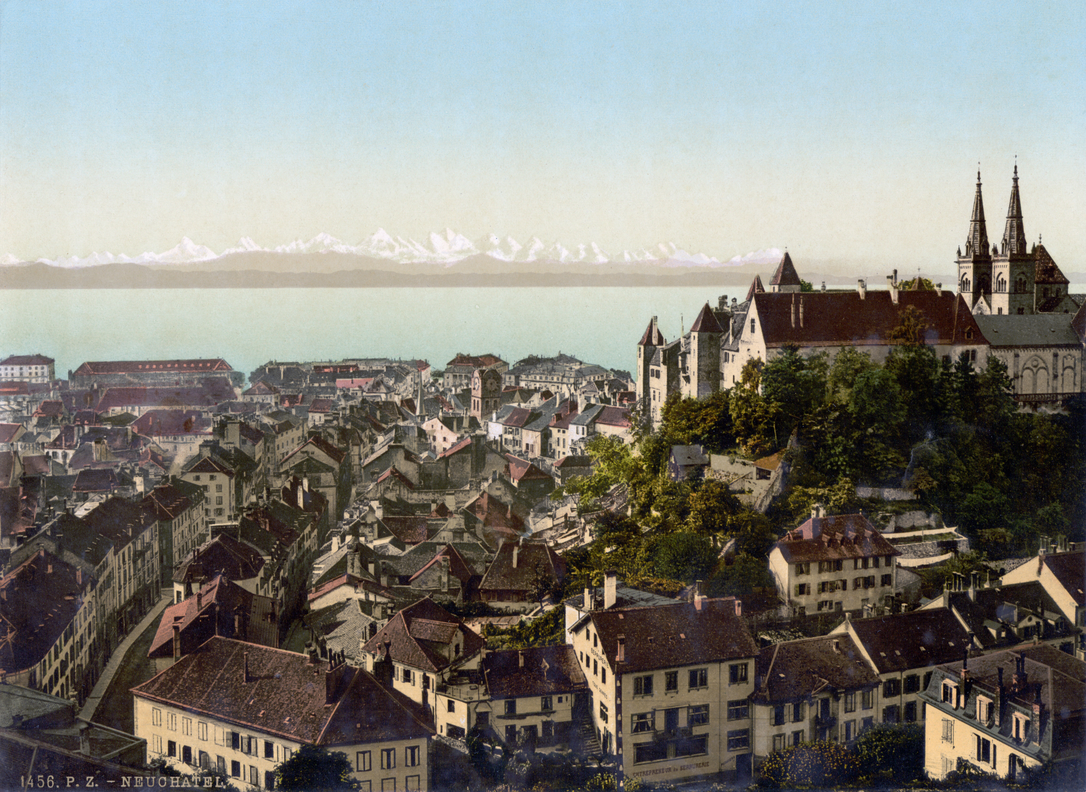 Neuchâtel um 1900 (Kongressbibliothek)